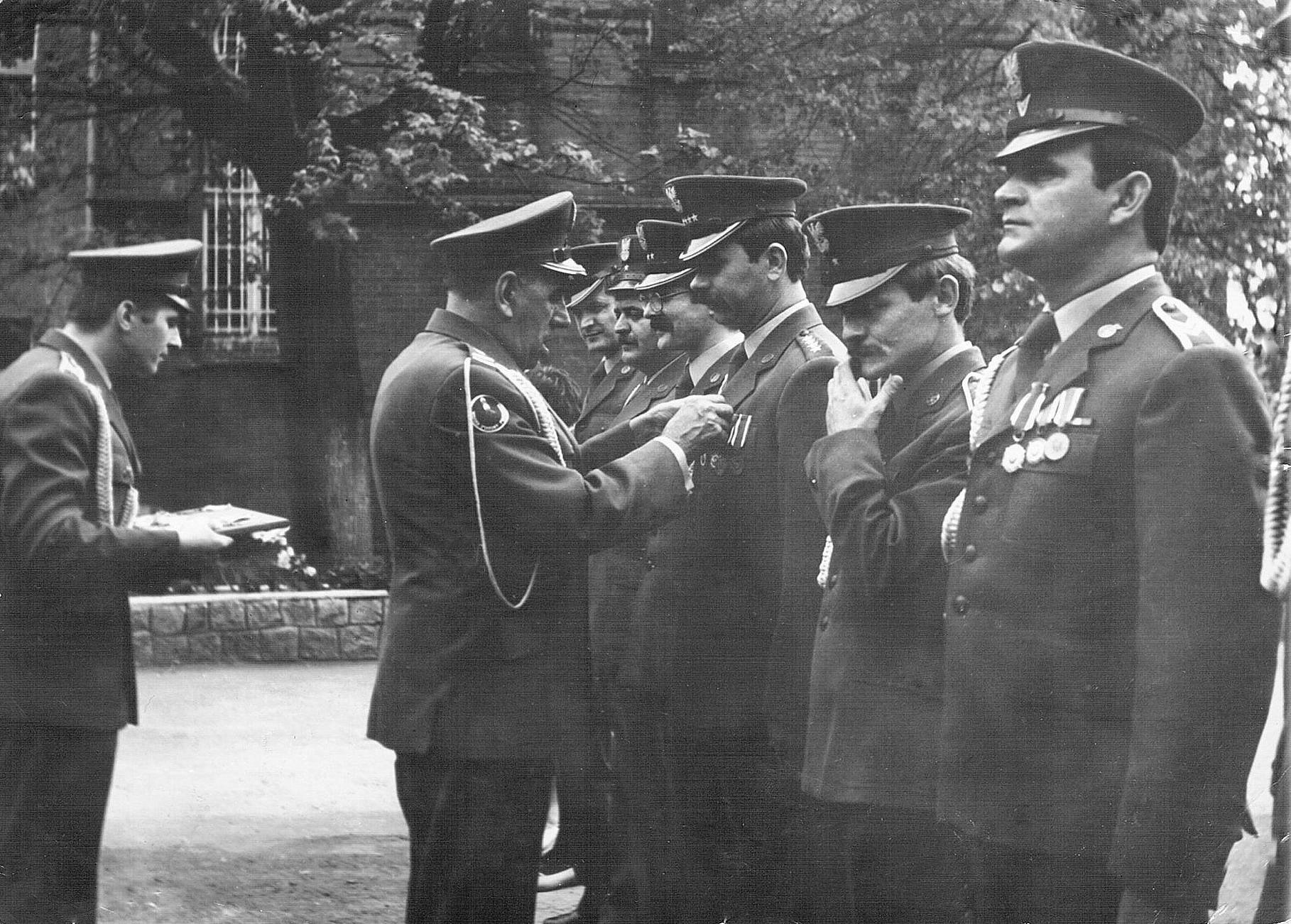 Dowódca batalionu ppłk Piotr Węglowski dekoruje wyróżnioną kadrę bg WOP i strażnicy WOP Gierałcice na placu apelowym, podczas uroczystej zbiórki z okazji Święta Ludowego Wojska Polskiego – batalion graniczny WOP Prudnik.